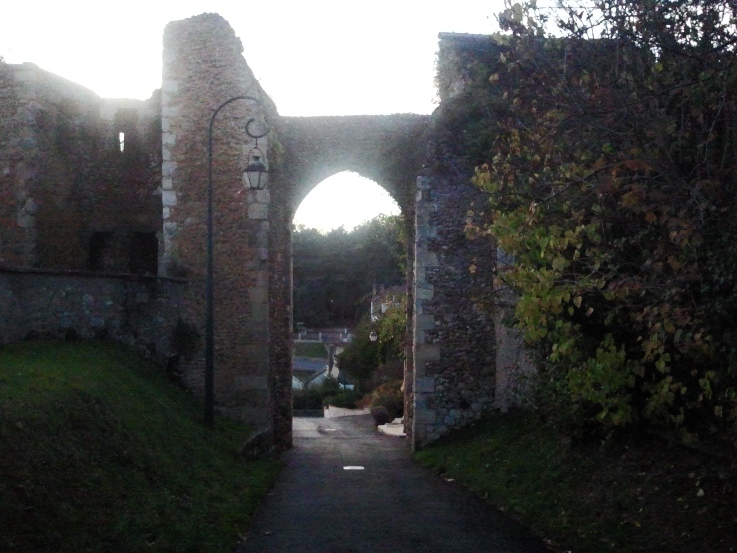 Ancienne porte du château et son principal accès ; de nos jours c'est le principal accès à l'église St-Étienne de Château-Renard (derrière nous sur la photo). Aussi appelée "la porte rouge" : on y pendait les trophées de chasse et de guerre et les corps des suppliciés.